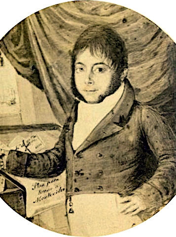 Reproducción fotográfica de un retrato pictórico del comerciante español y miembro de la Primera Junta de Gobierno. Este retrato miniatura se conserva en el Museo Histórico Nacional, en la obra se destaca la exhibición de un documento encabezado con el título "Plan para tomar a Montevideo"